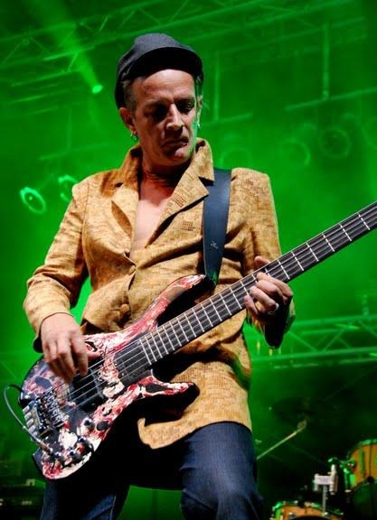 Ingo York live 2012